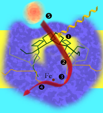 Reaktionszentrum Photosynthese nach Couglas C. Youvan, Barry L. Marrs, Molekulare Mechanismen der bakteriellen Photosynthese, in Spektrum der Wissenschaft August 1987, Heft 8, S. 62 ff; selbst erstellt